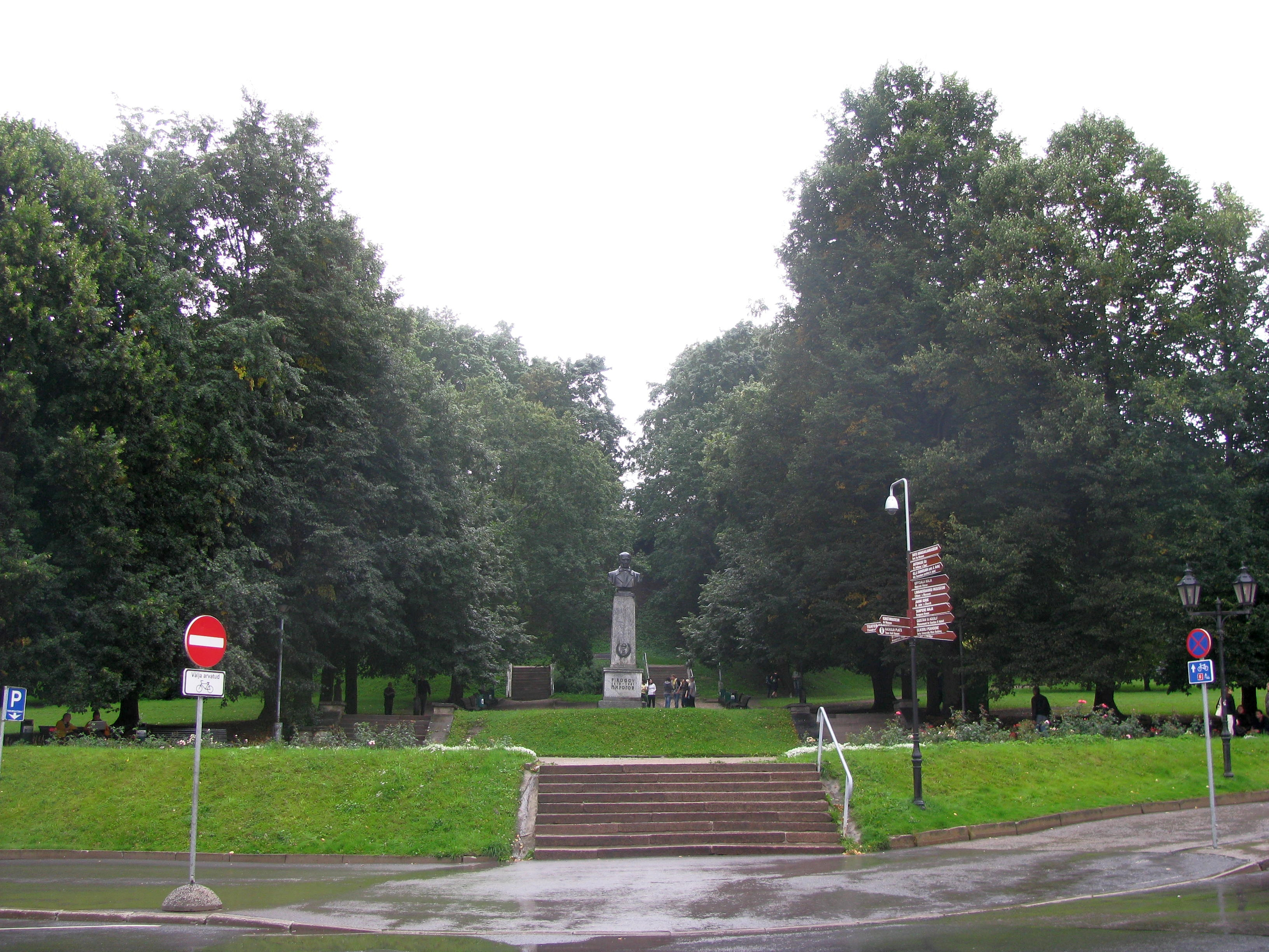 Vihmane Pirogovi plats Tartus, Lossi ja Ülikooli tänava nurgal.